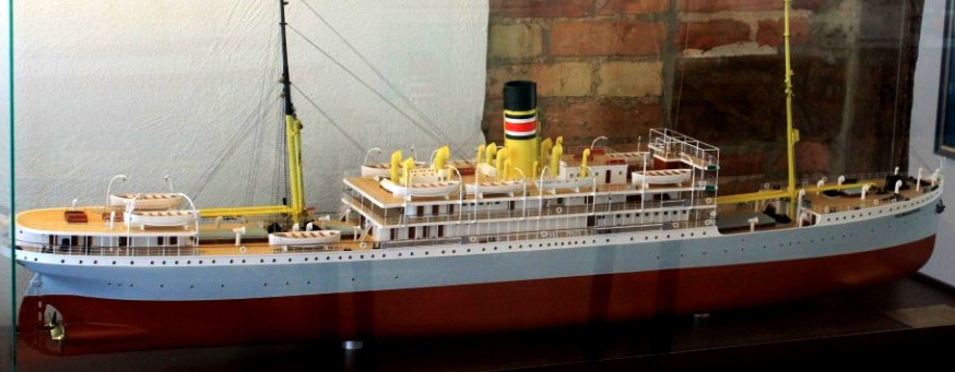 Modell vom Reichspostdampfer Feldmarschall im Schifffahrtsarchiv Rendsburg